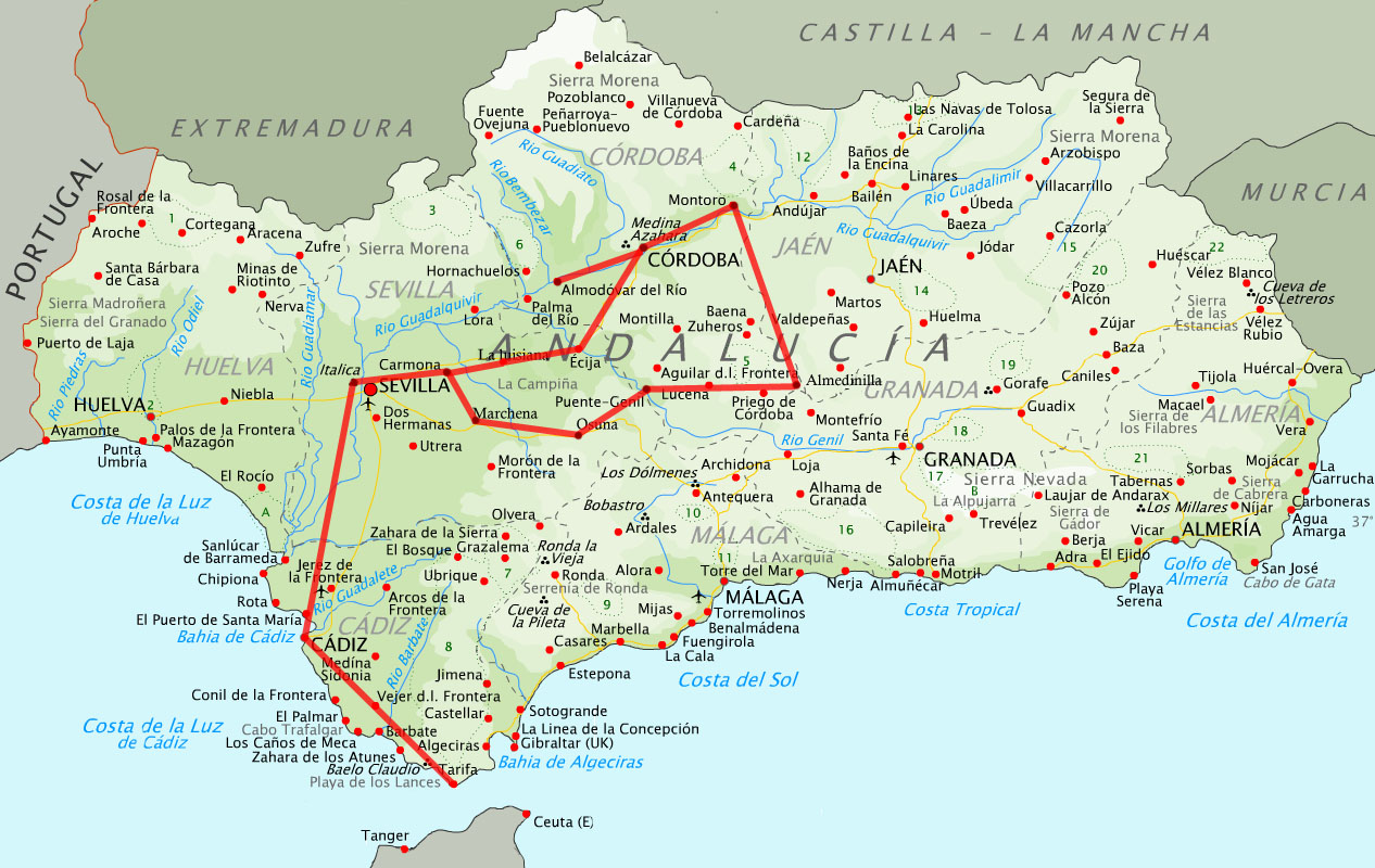 Roman Baetica Rute